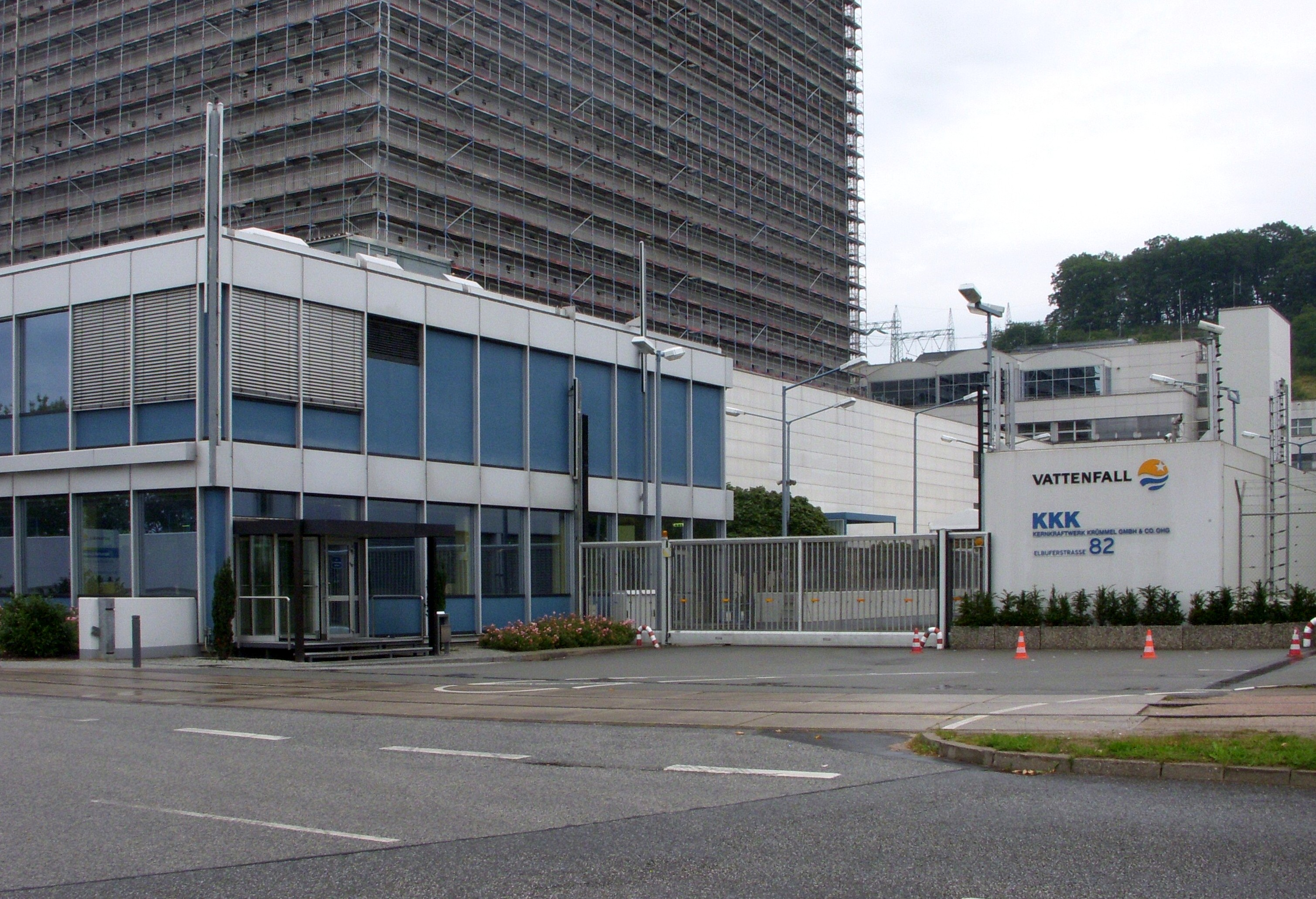 Kraftverk Krümmel, entréområde